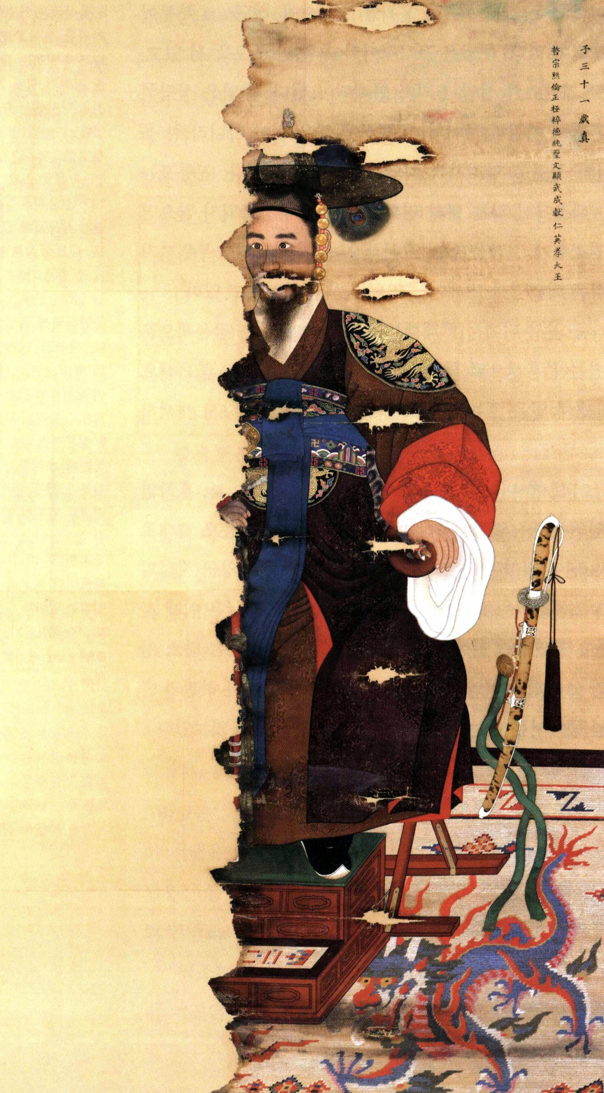 哲宗大王御真。修正前半焼。